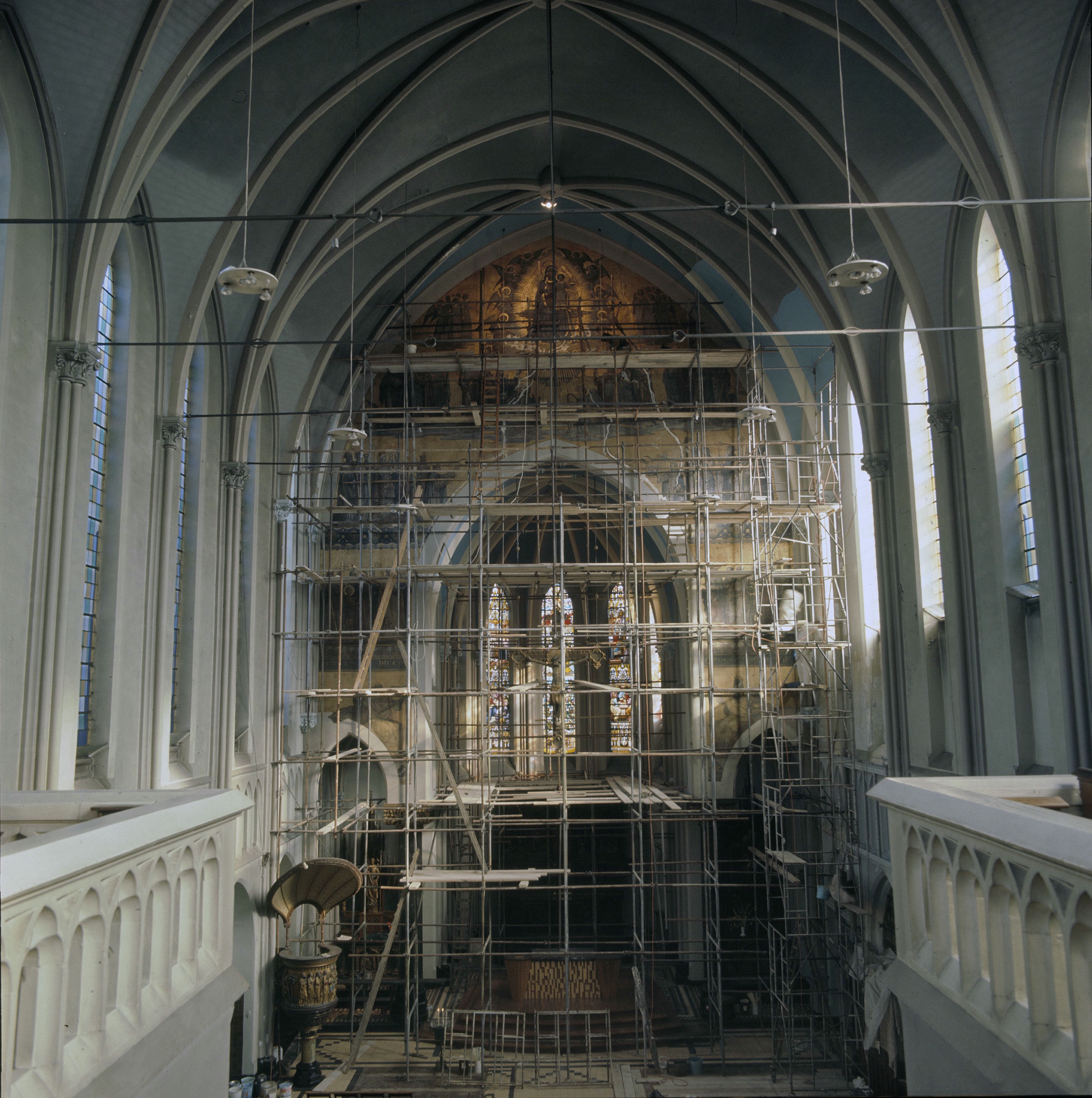 Kapel In Het Zand: Interieur naar het oosten met schildering in het koor